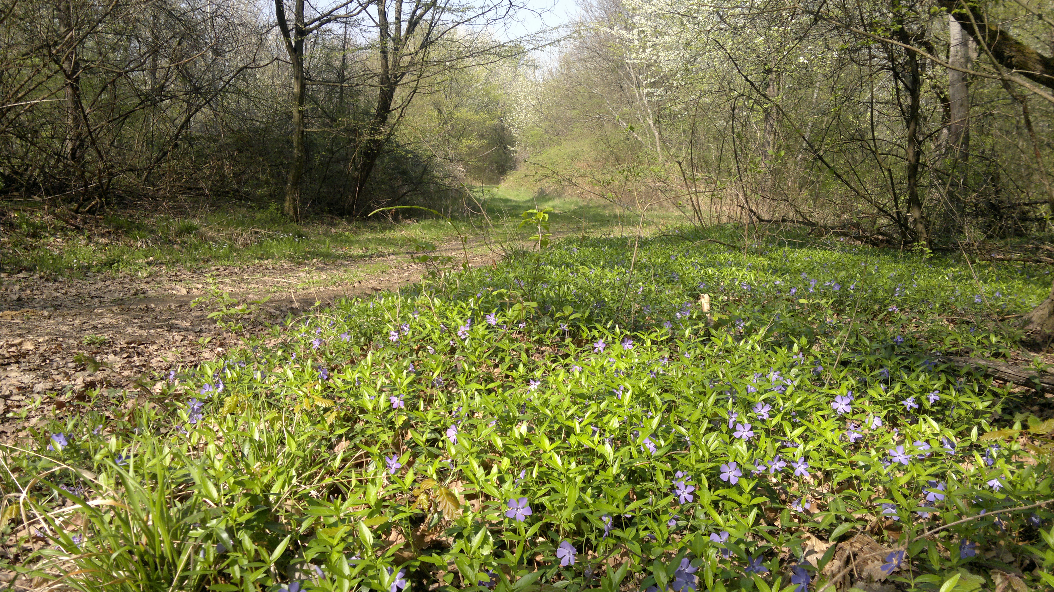 34310, Viškovci, Croatia??? Based coords: Srednje Selo, Pleternica, Požega-Slavonia County